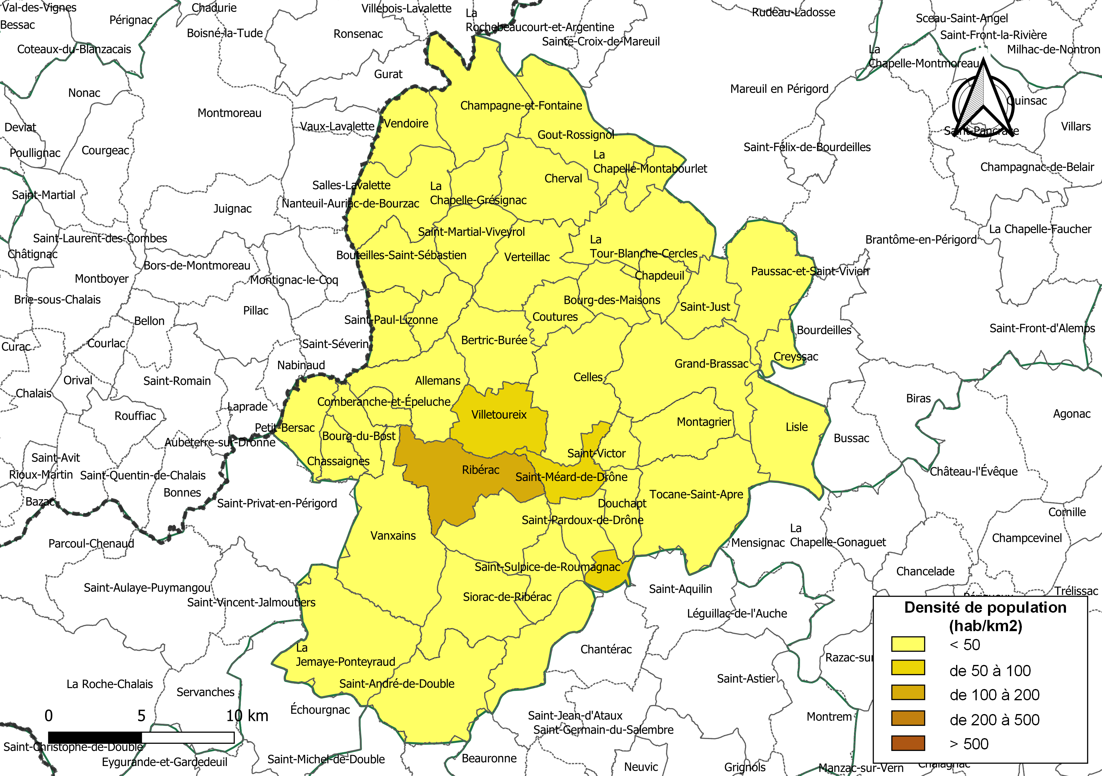 Carte des densités de population (millésimée 2016) des communes de la communauté de communes la Communauté de communes du Pays Ribéracois, département de la Dordogne, France. Composition au 1er janvier 2019.